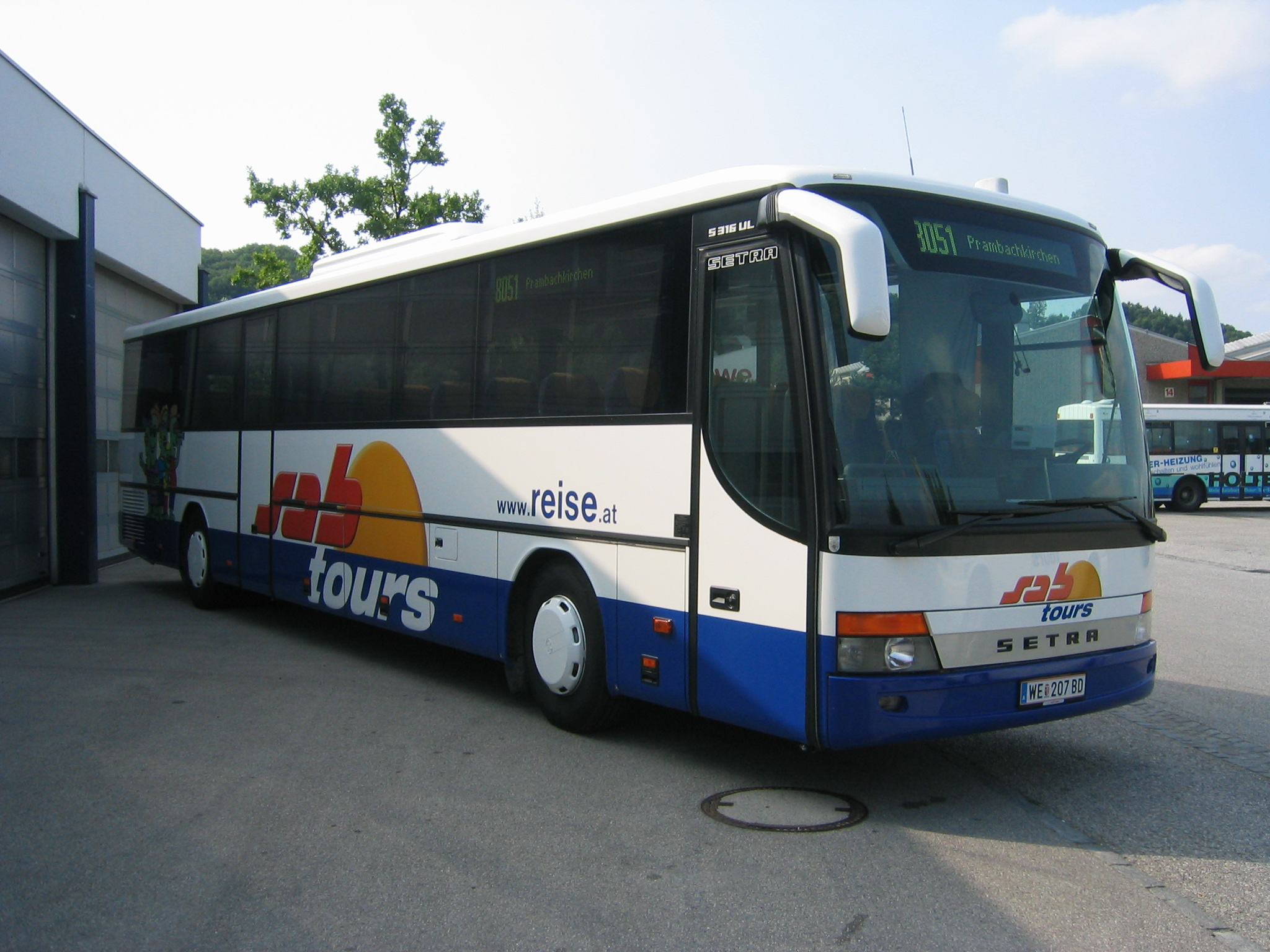 1 Setra UL von sabtours